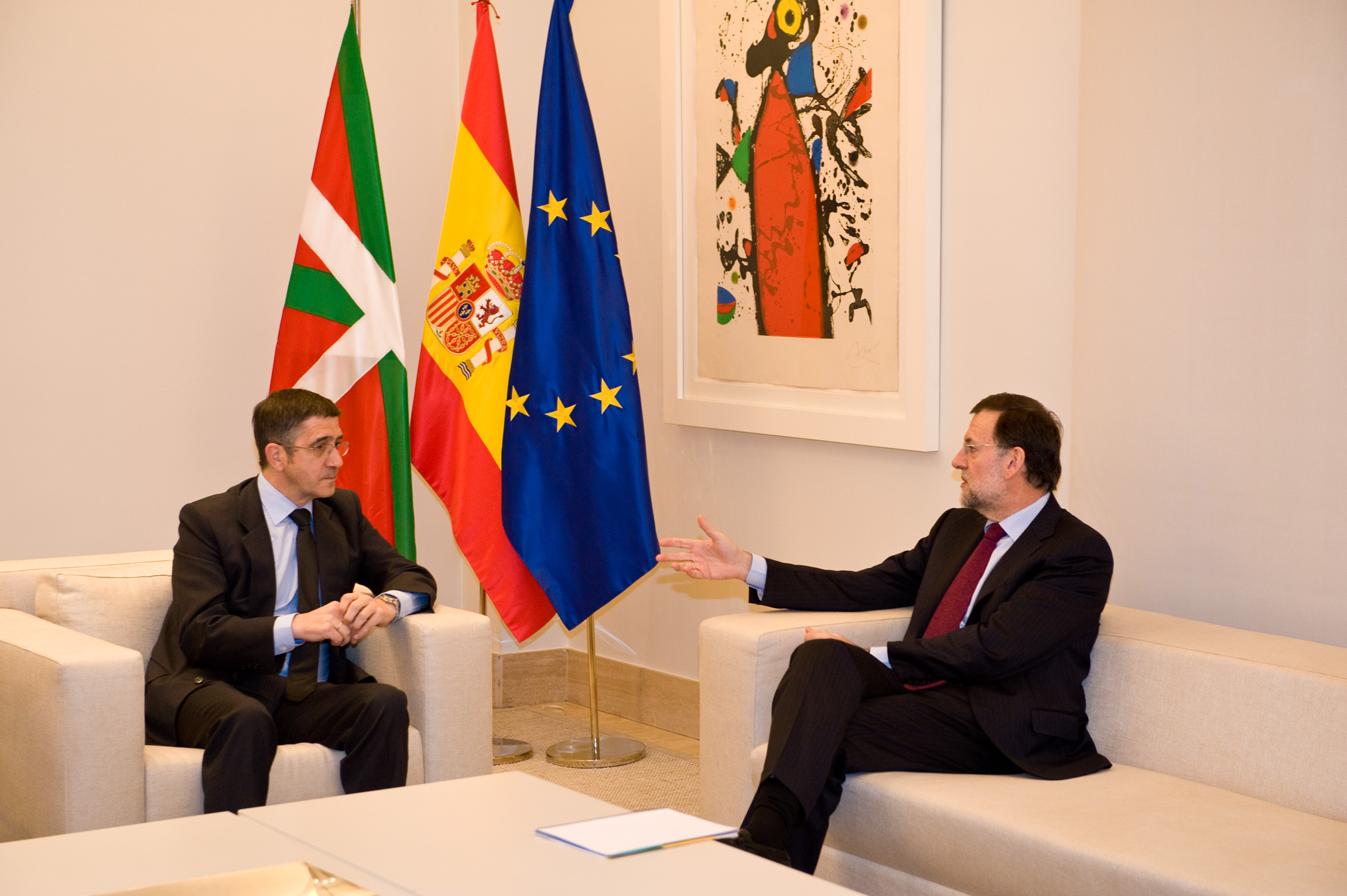 El expresidente del gobierno Mariano Rajoy en reunión con el presidente de la comunidad autónoma del País Vasco, el lehendakari, Patxi López en un salón de La Moncloa en 2012